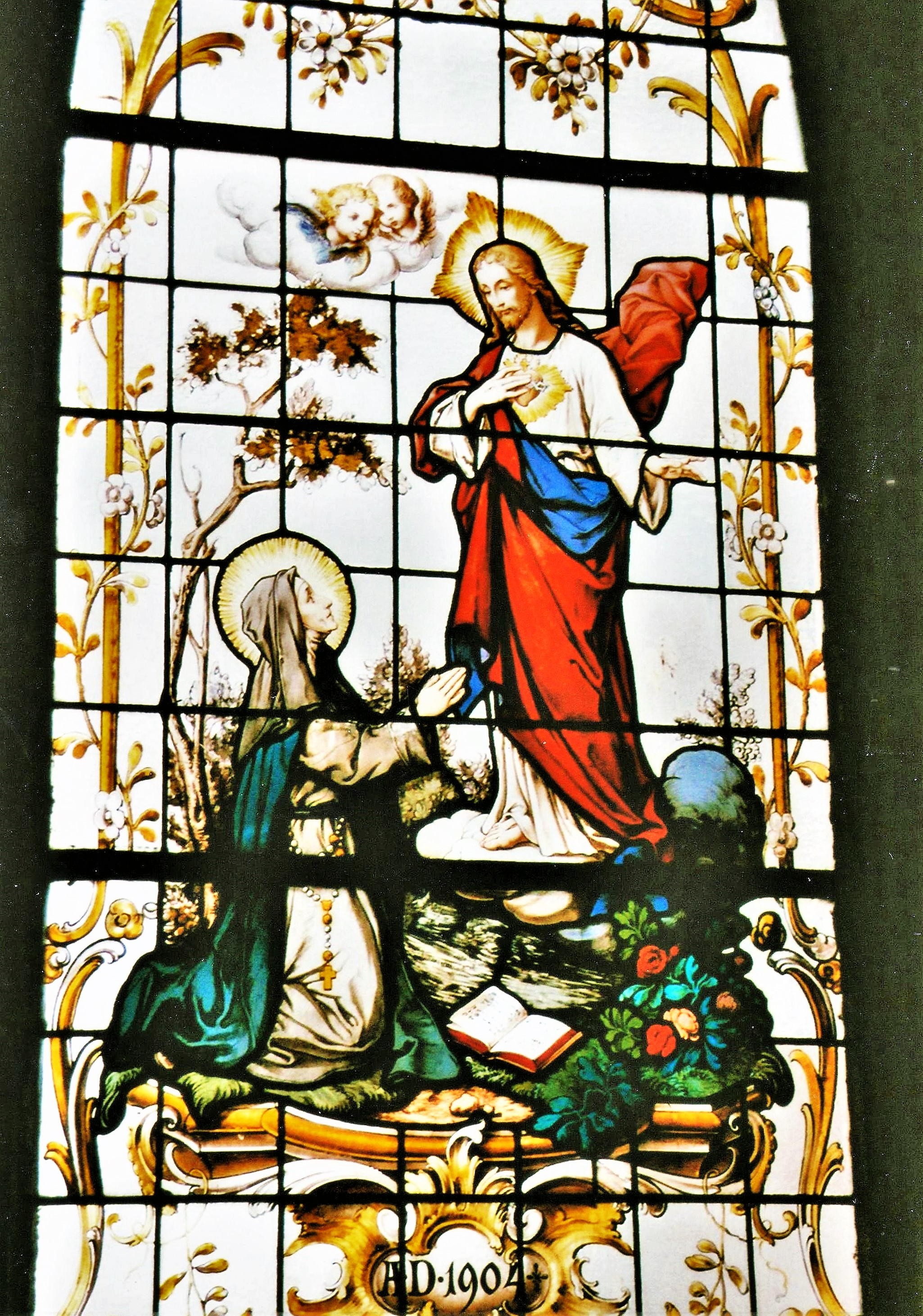 St. Michael (Lohr am Main), nördliches Langhausfenster: Christusvision der heiligen Margareta Maria Alacoque (1904)